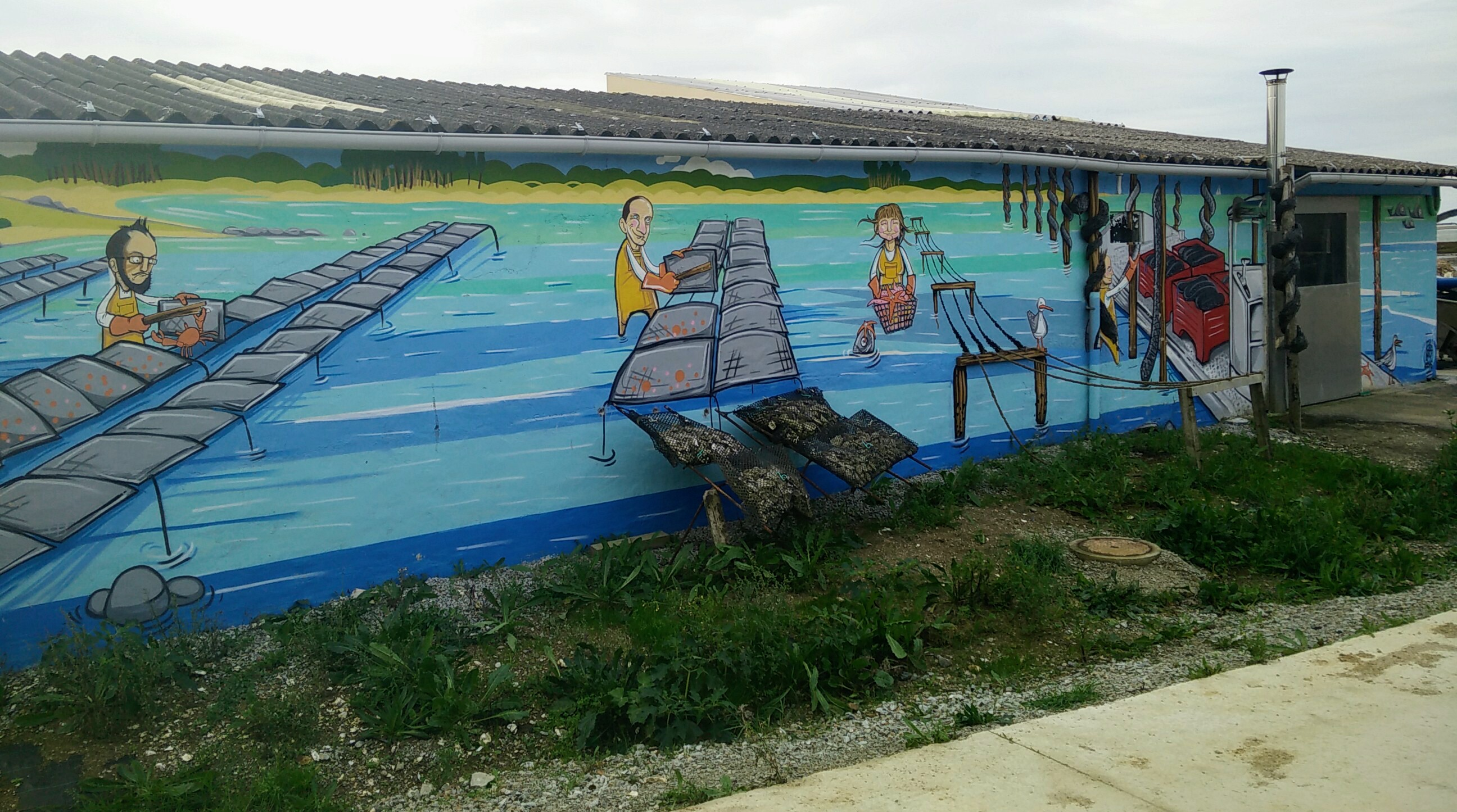 Fresque sur un bâtiment ostréicole à Pencadenic sur la commune du Tour-du-Parc.